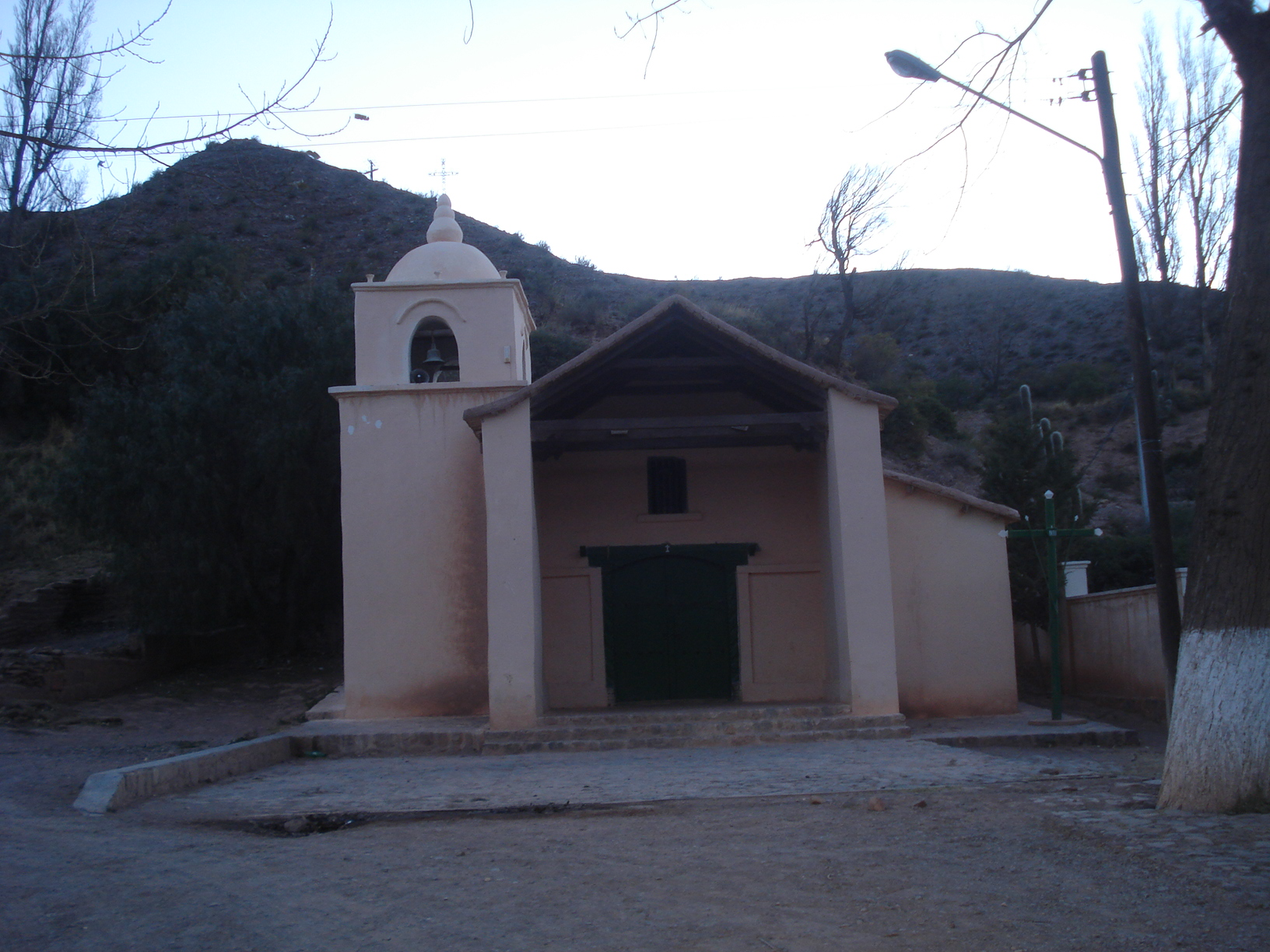 Capilla de la Inmaculada Concepción, en el pueblo de Huacalera, Jujuy, Argentina.